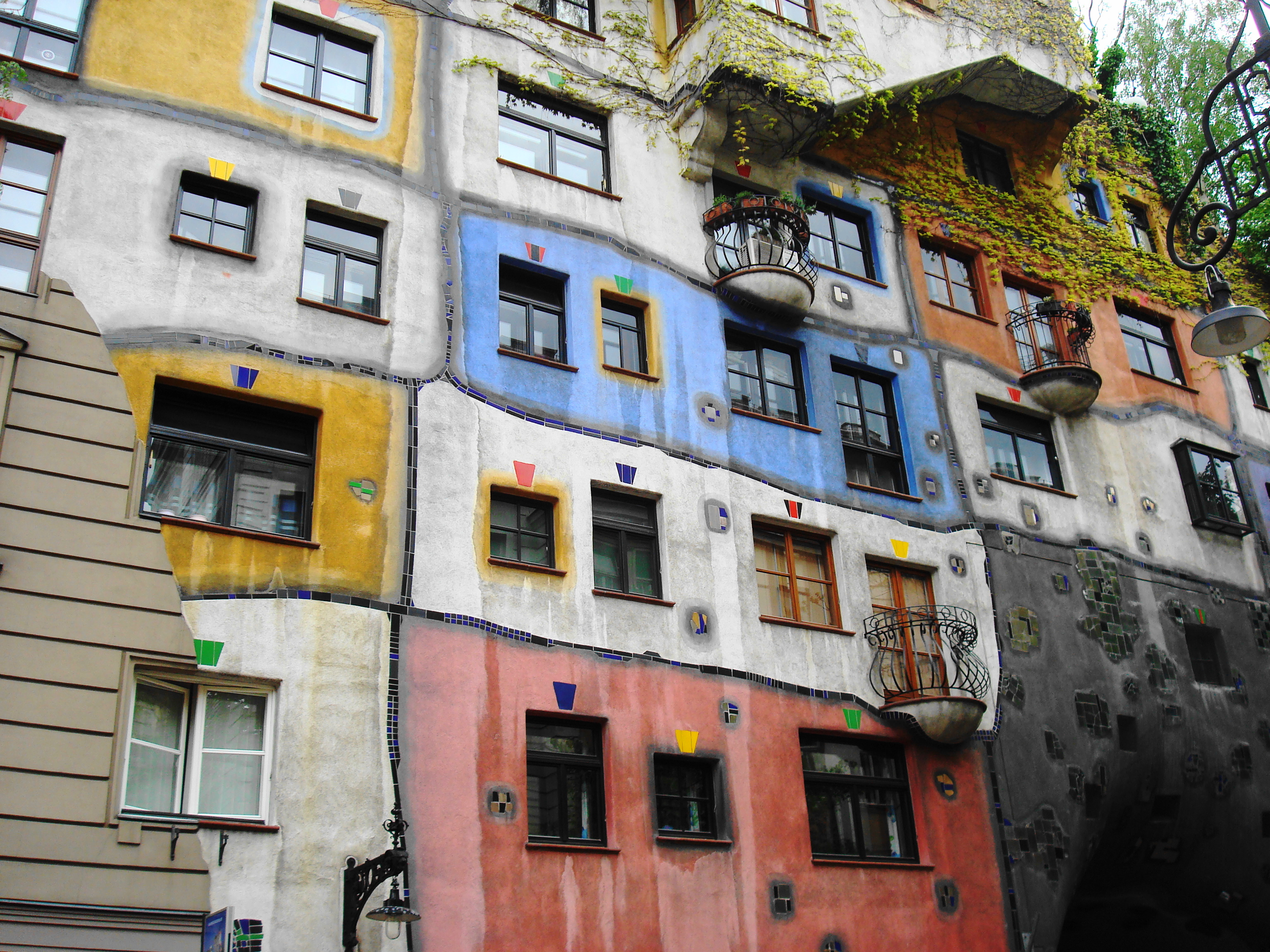 Дом Хундертвассера был построен в 1986 году по проекту архитектора Фр. Хундертвассера. В нем нет прямых линий. Ни стены, ни полы, ни лесницы... Дом разукрашен в разные цвета, а также декорирован множеством растений, в том числе и деревьями, которые ростут у него на крыше.